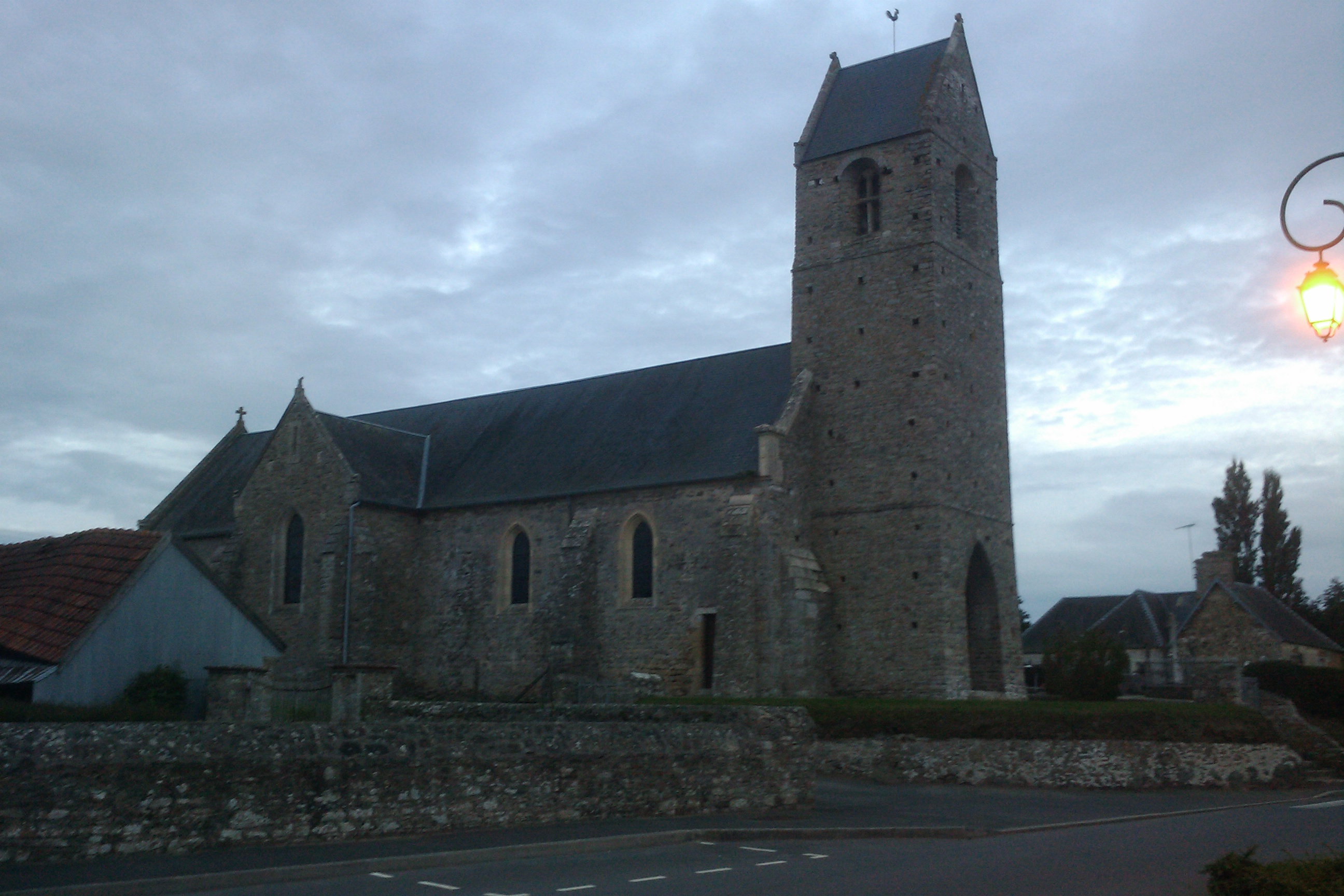 Église du Mesnil-Vigot